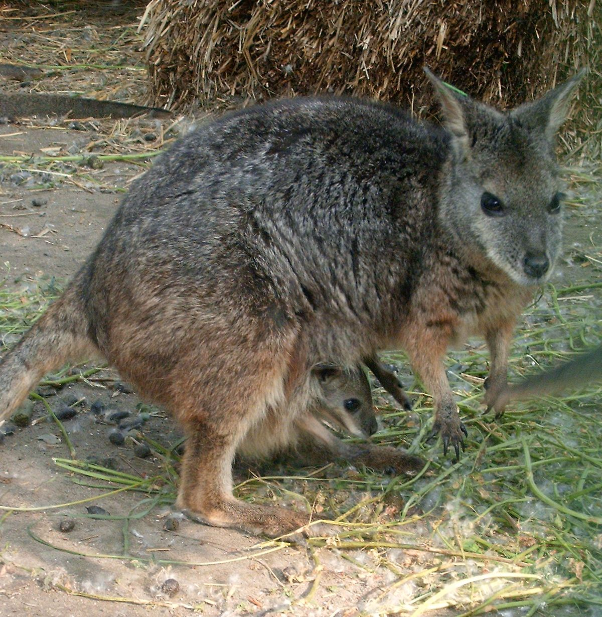 Macropus eugenii in Budapest Zoo